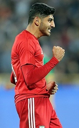 مهدی ترابی در دیدار تیم‌های فوتبال ایران و بولیوی